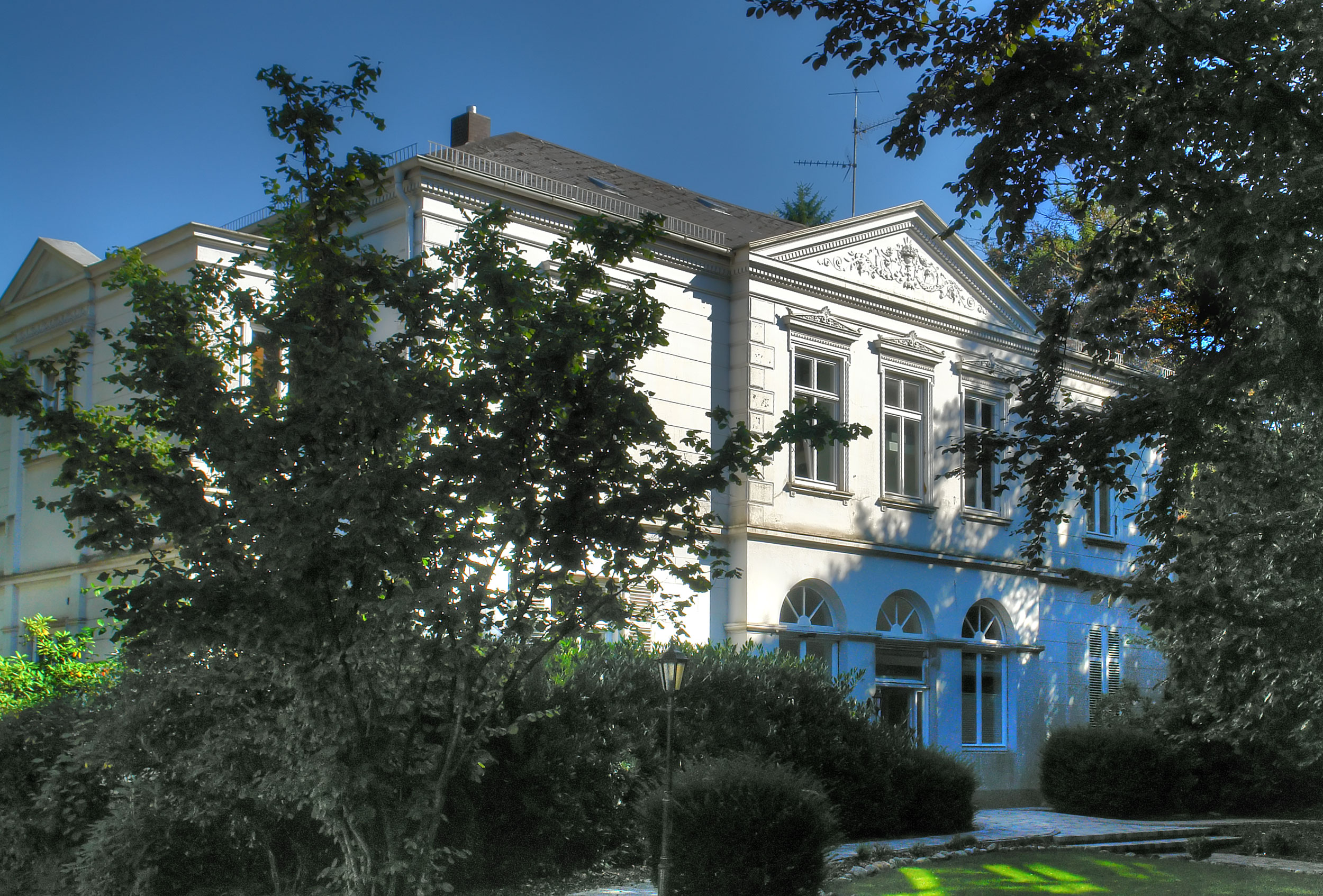 Haus Meier in Bremen, Horner Heerstraße 7Das abgebildete Objekt ist ein geschütztes Kulturdenkmal in der Freien Hansestadt Bremen, mit der Nr. 1194 beim Landesamt für Denkmalpflege registriert.